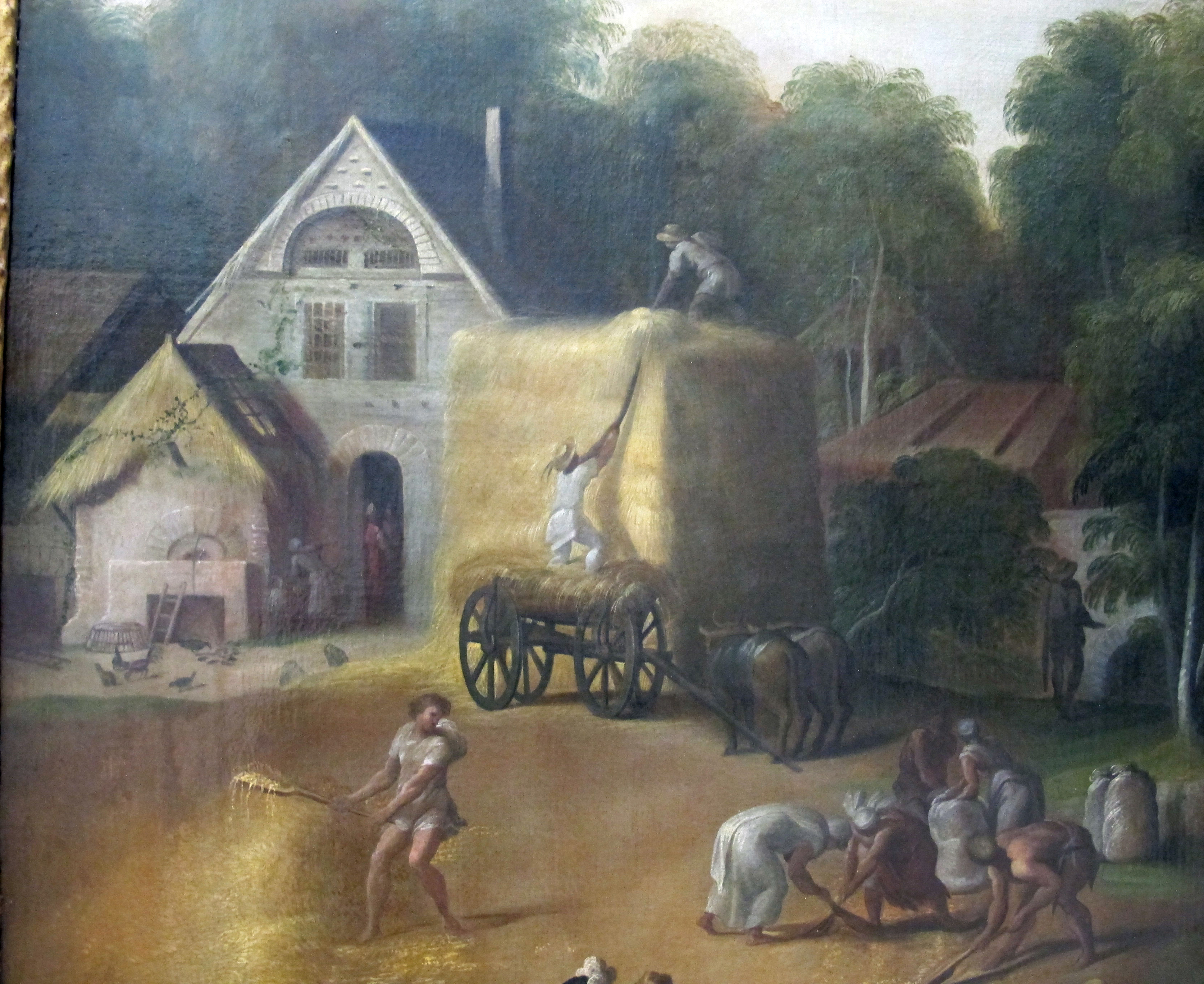 Pittura italiana del XVI secolo, Louvre